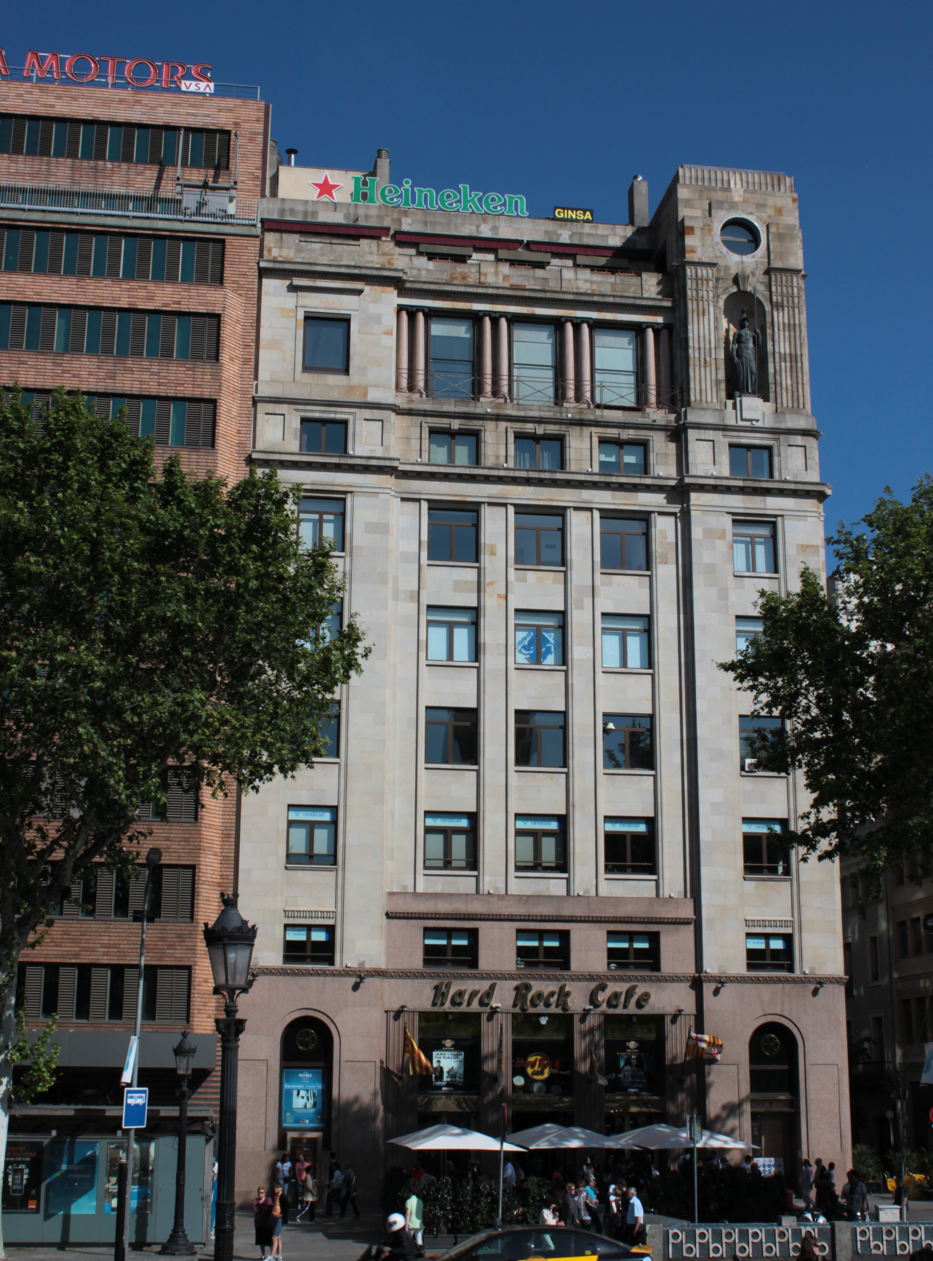 Façade du Hard Rock Café, plaça de Catalunya, Sp-Barcelone.